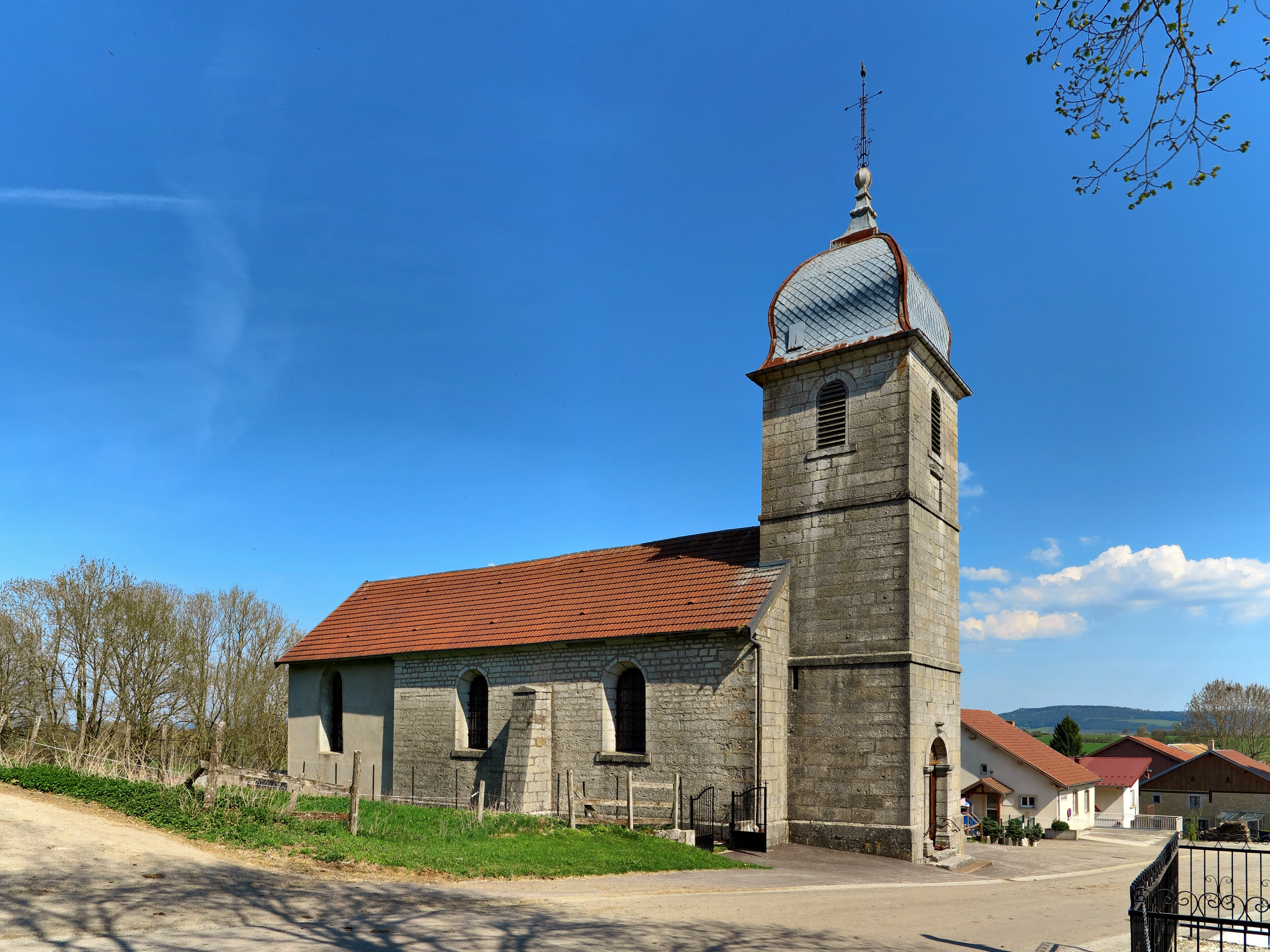 L'église